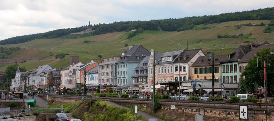 Rüdesheim am Rhein, vom Rhein aus gesehen. Im Hintergrund über der Stadt das Niederwalddenkmal, rechts die Kabinenseilbahn.